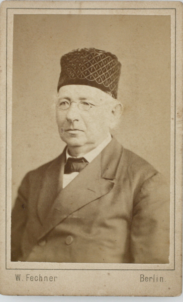 Atelieraufnahme des Aron Bernstein (1812-1884), c. 1883. Aron/Aaron Bernstein war Schriftsteller und Mitbegründer der jüdischen Reformgemeinde in Berlin.